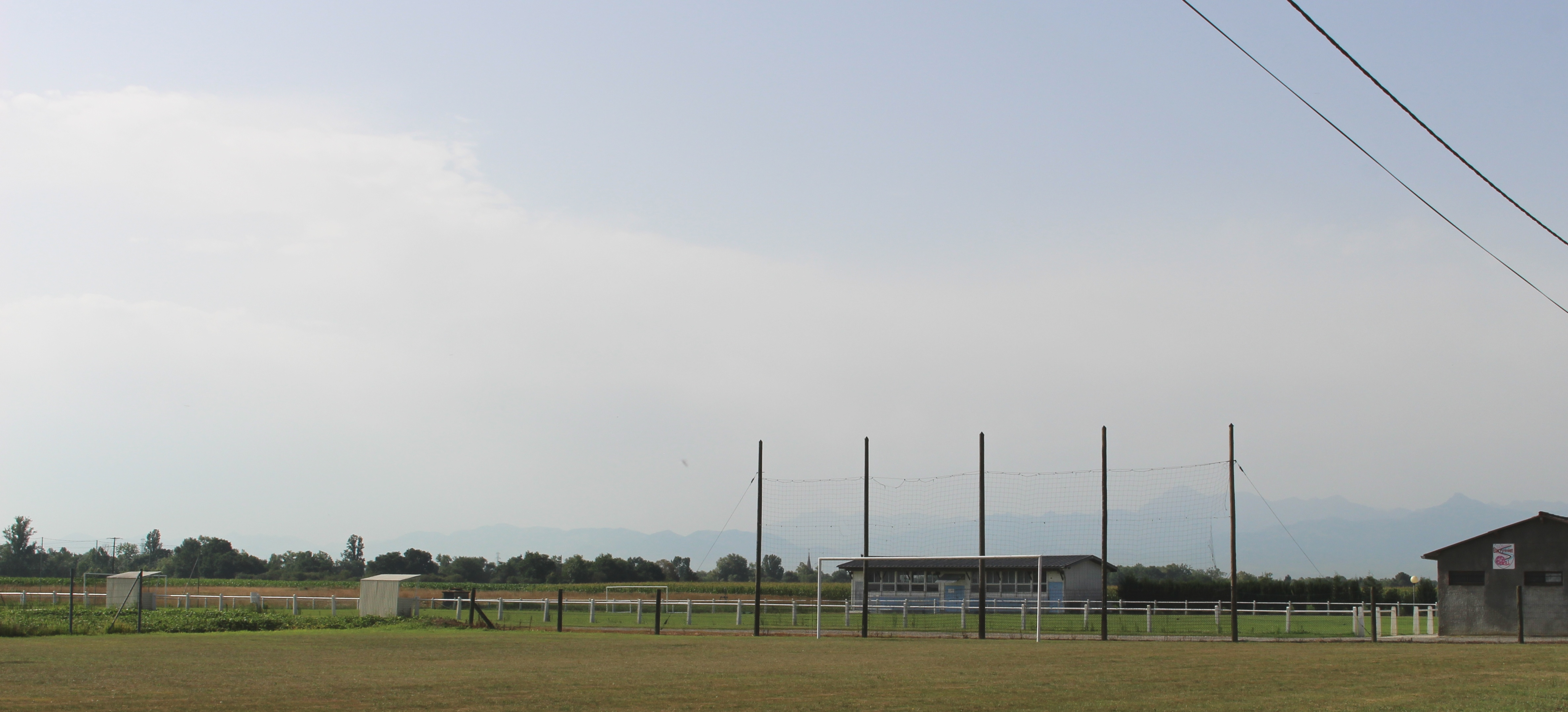 Stade de football de Lagarde (Hautes-Pyrénées)